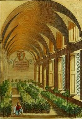 hand-colored engraving depicting citrus growing techniques (Zitruspflanzenkultur). Nach einer Illustration aus Hesperides von Giovanni Battista Ferrari, 1646